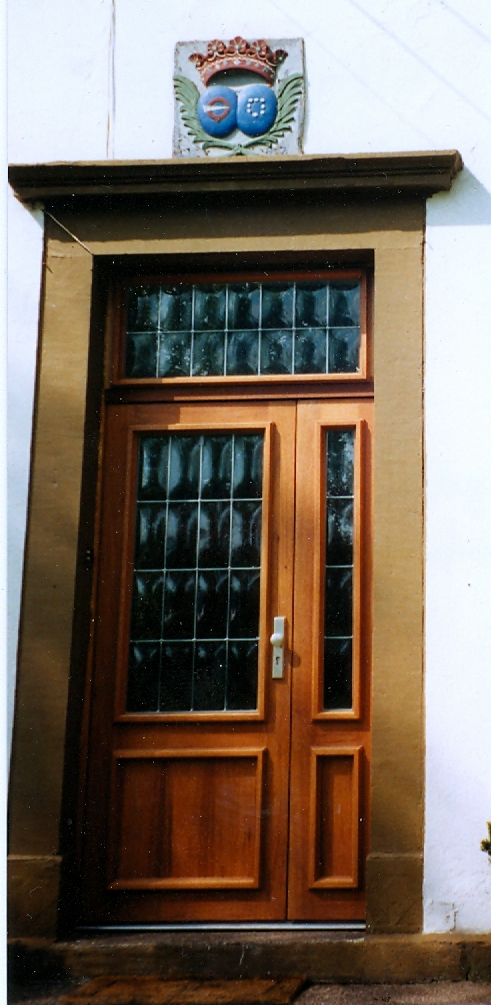 Tür zum ehemaligen freiadeligen Rittergut Nagelsgaul